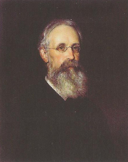 Porträt von Josef Kolbe (1825–1897), im Studienjahr 1871/72 Rektor des k.k. Polytechnischen Institutes Wien